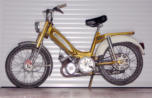 E Flandria-Vëlomoto vun 1975